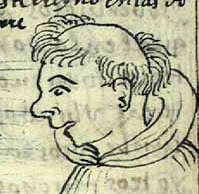 Fray Martín de Murúa, by Felipe Huamán Poma de Ayala. Nueva Corónica f. 661v. Portrait detail